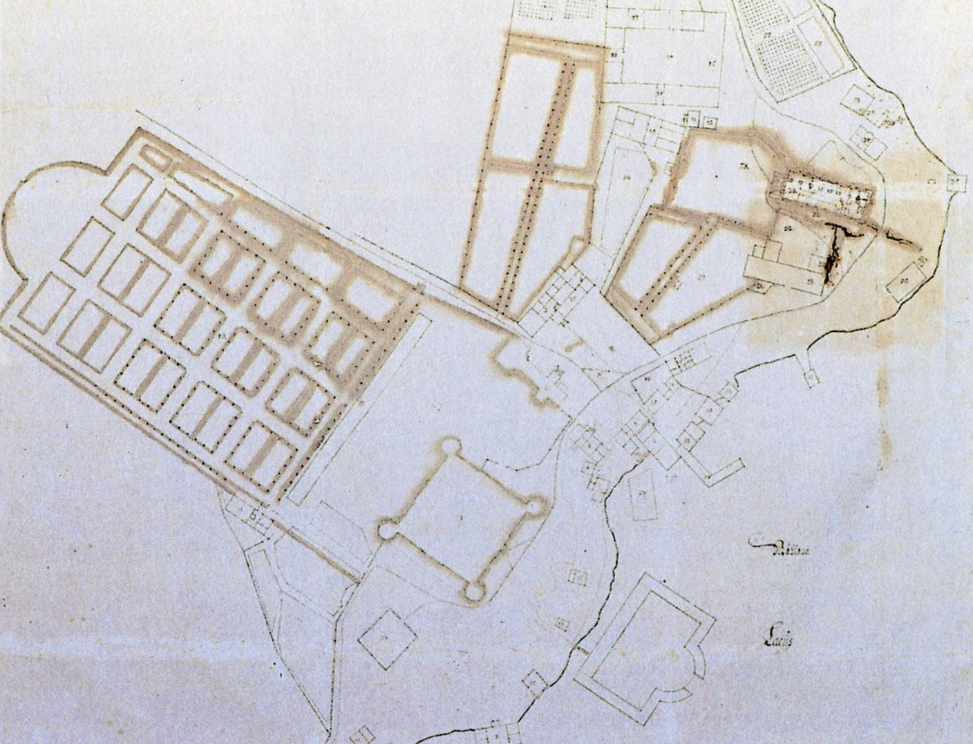 Skokloster planritning över parken med ett flertal bostäder för bl.a. arbetare och hantverkare, som numera är rivna.